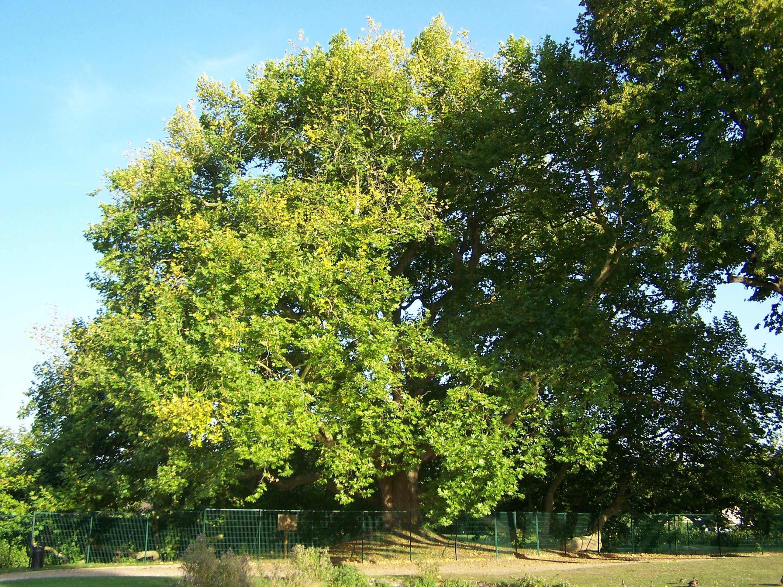 Arbre de Diane aux Clayes-sous-Bois (Yvelines, France). Photo personnelle Arbre de Diane (Diane's tree) in Les Clayes-sous-Bois (Yvelines, France). Personal picture. Auteur/Author : ℍenry Salomé Ce platane aurait été planté vers 1556 pour Diane de Poitiers. This plane tree is said to have been planted in 1556 for Diane de Poitiers.